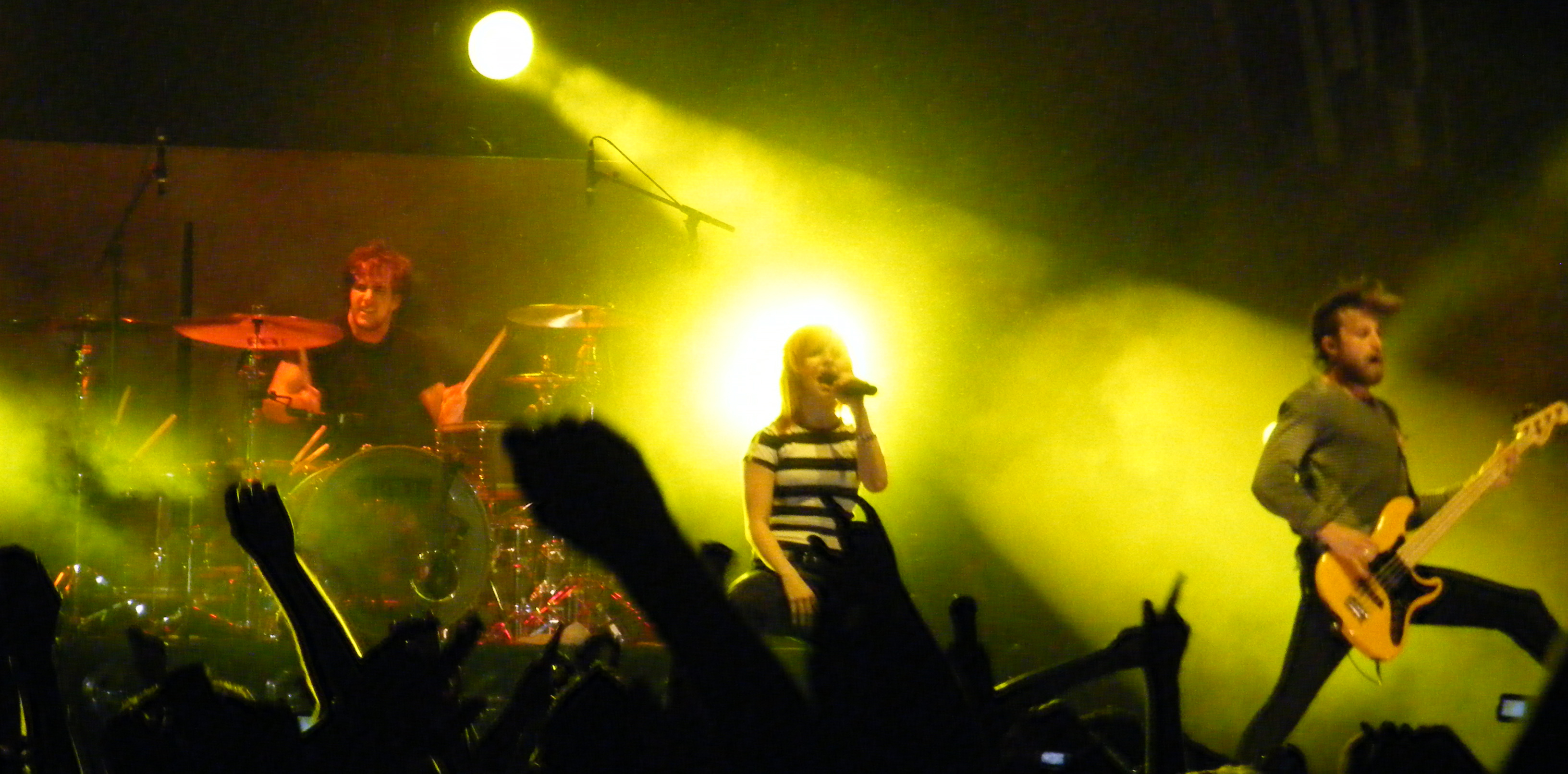 Paramore en un concierto en Filadelfia el 15 de agosto de 2008. En la imagen: Zac Farro, Hayley Williams y Jeremy Davis.